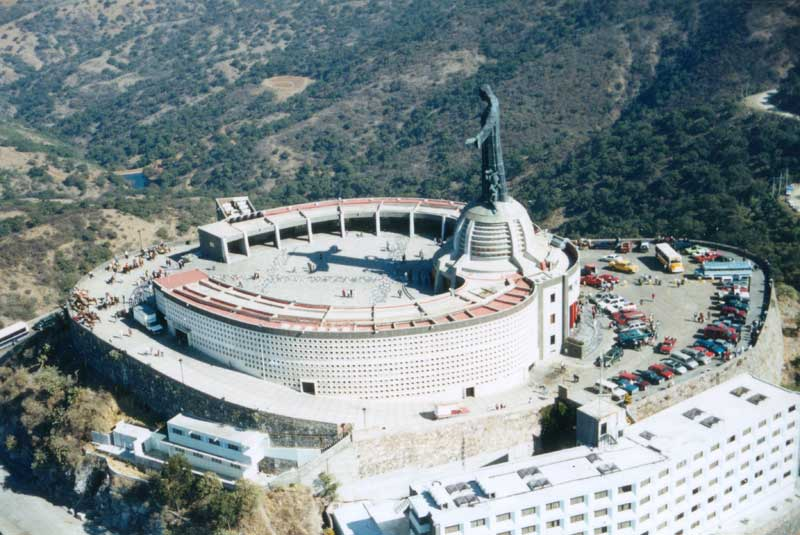 Monumento a Cristo Rey en el Cerro del Cubilete en Silao, Guanajuato, México, Arq. Nicolás Mariscal y Piña (autor del Proyecto) y el Arq. José Carlos Ituarte González constructor de dicho proyecto.